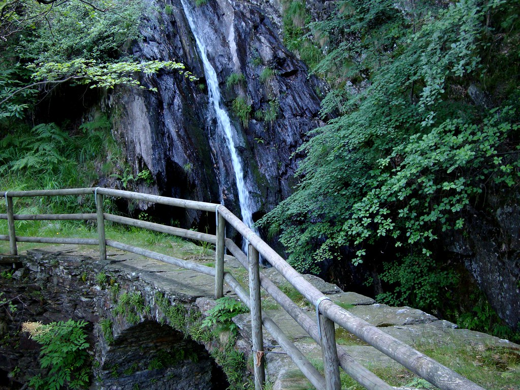 Un tratto della strada Borromea